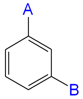 Meta-positie op aromaat